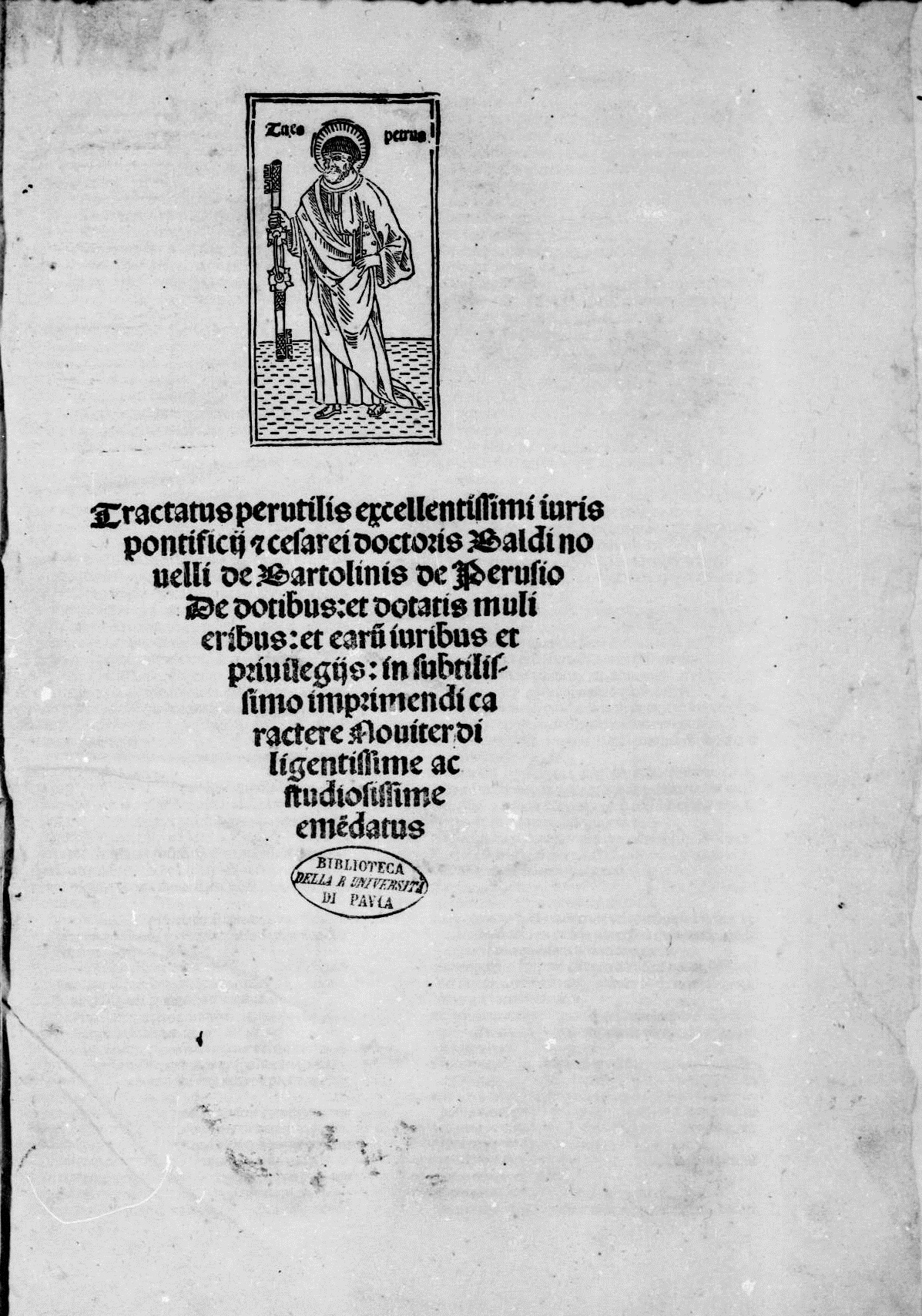 Frontespizio